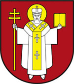 Nowy herb miasta Łuck od 23.08.2007